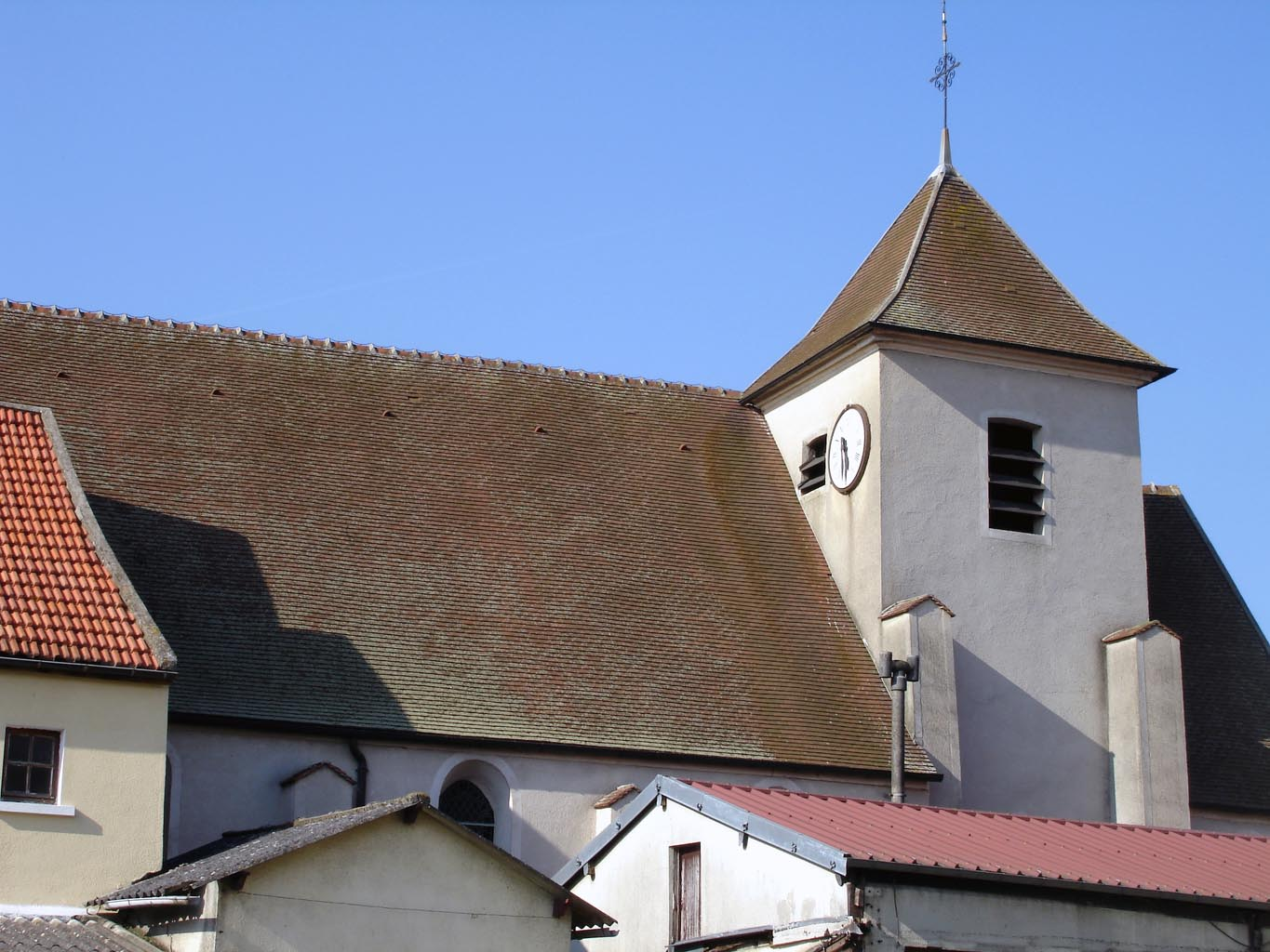 Eglise de Courtry (Seine-et-Marne), France